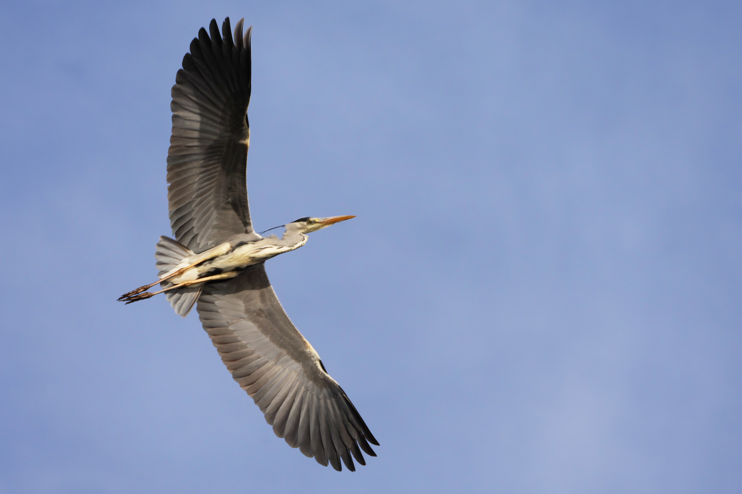 Graureiher am Krughorn im Europäischen Vogelschutzgebiet Westlicher Forst Düppel in Berlin